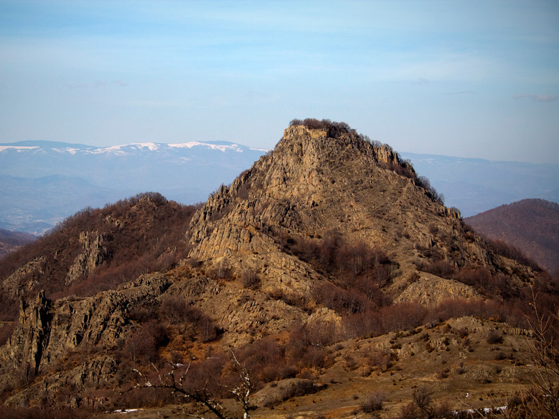 Тврђава Јелеч, фото: Бојан Миловић